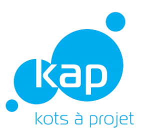 Logo général de tous les KAPs de l'UCL et de la marque KAP - Chaque KAP possède son propre logo également